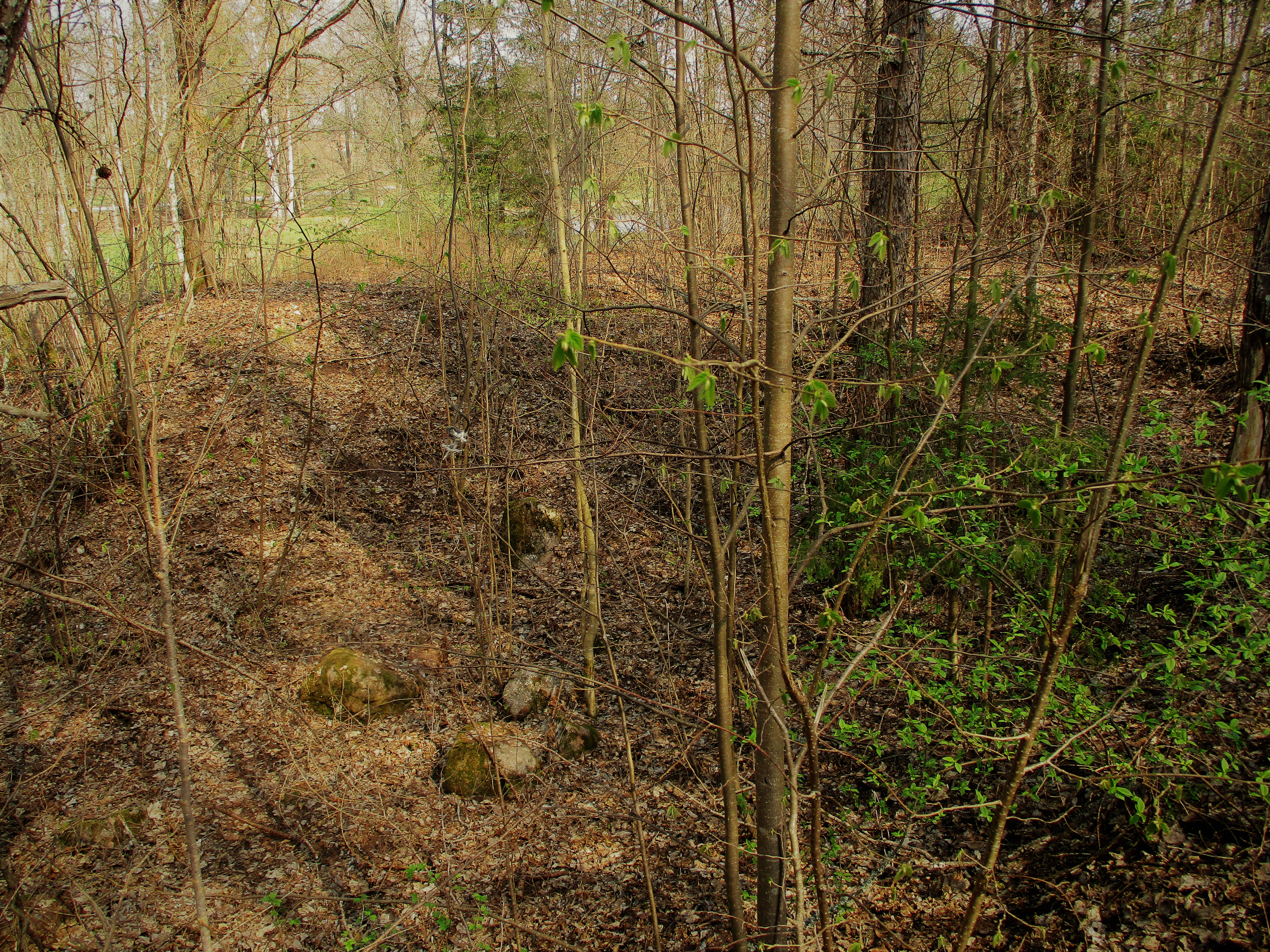 Oletatav linnuseala, maakivid vundamendirusudest. Vaade lõunasse.